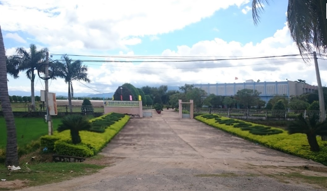 Viện Nha Hố